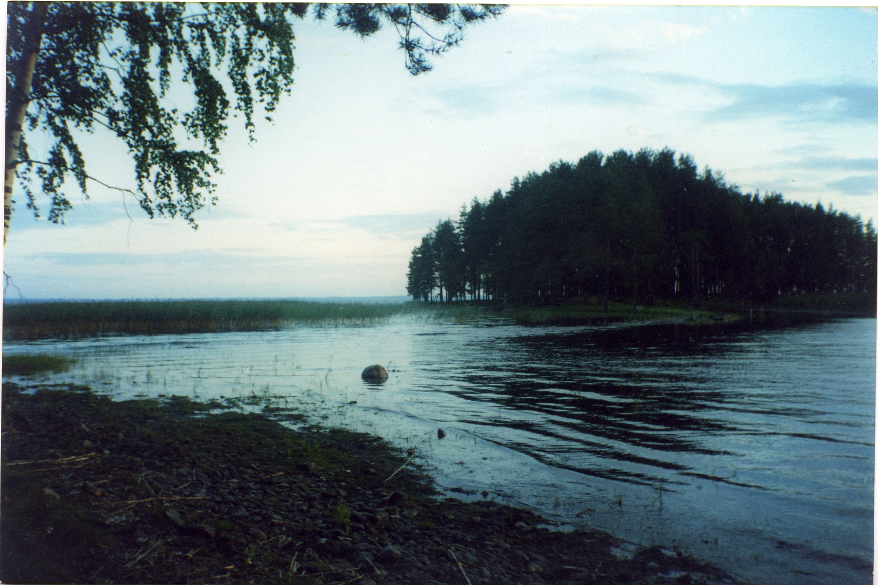 Янисъярви, озеро